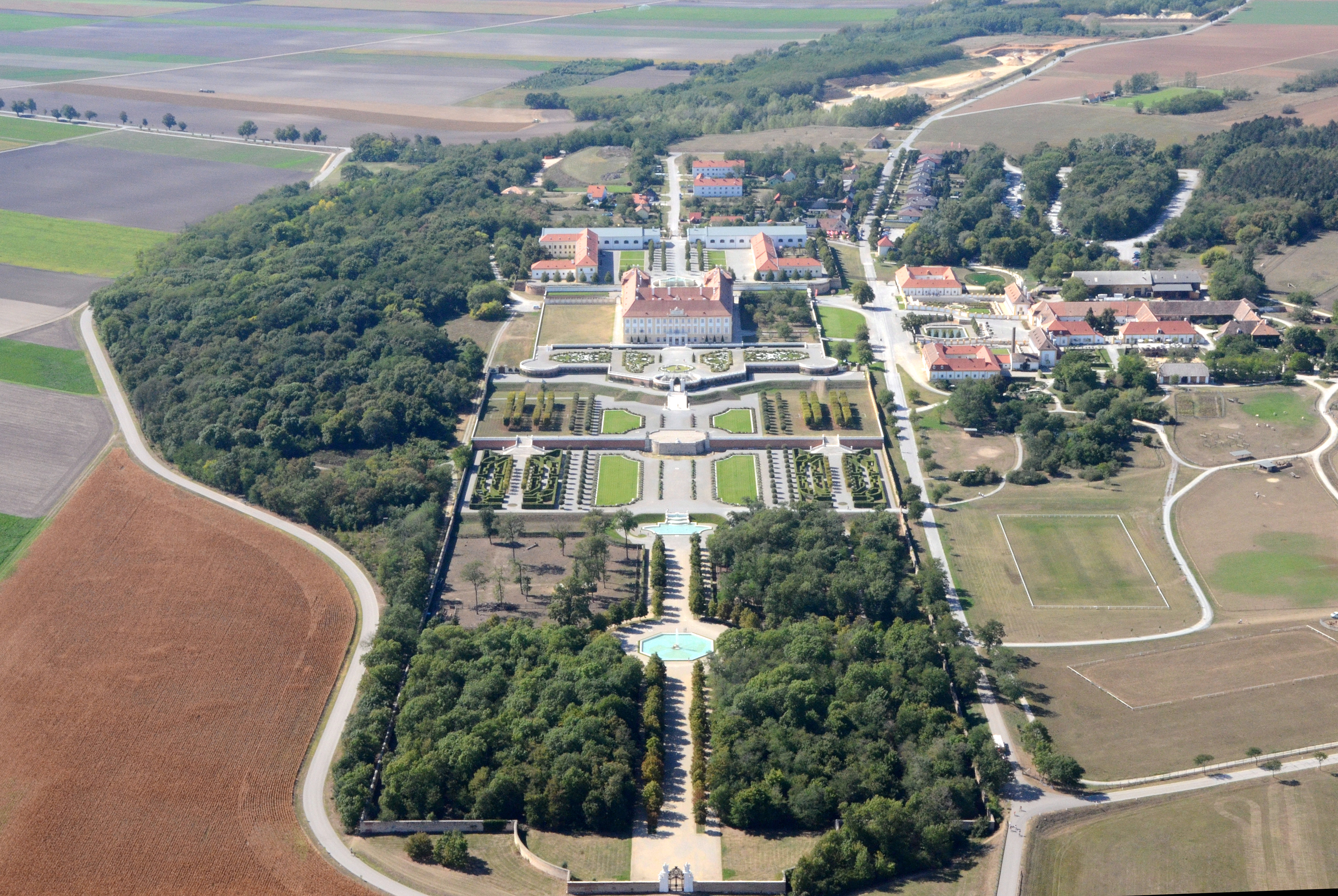 Schloßhof